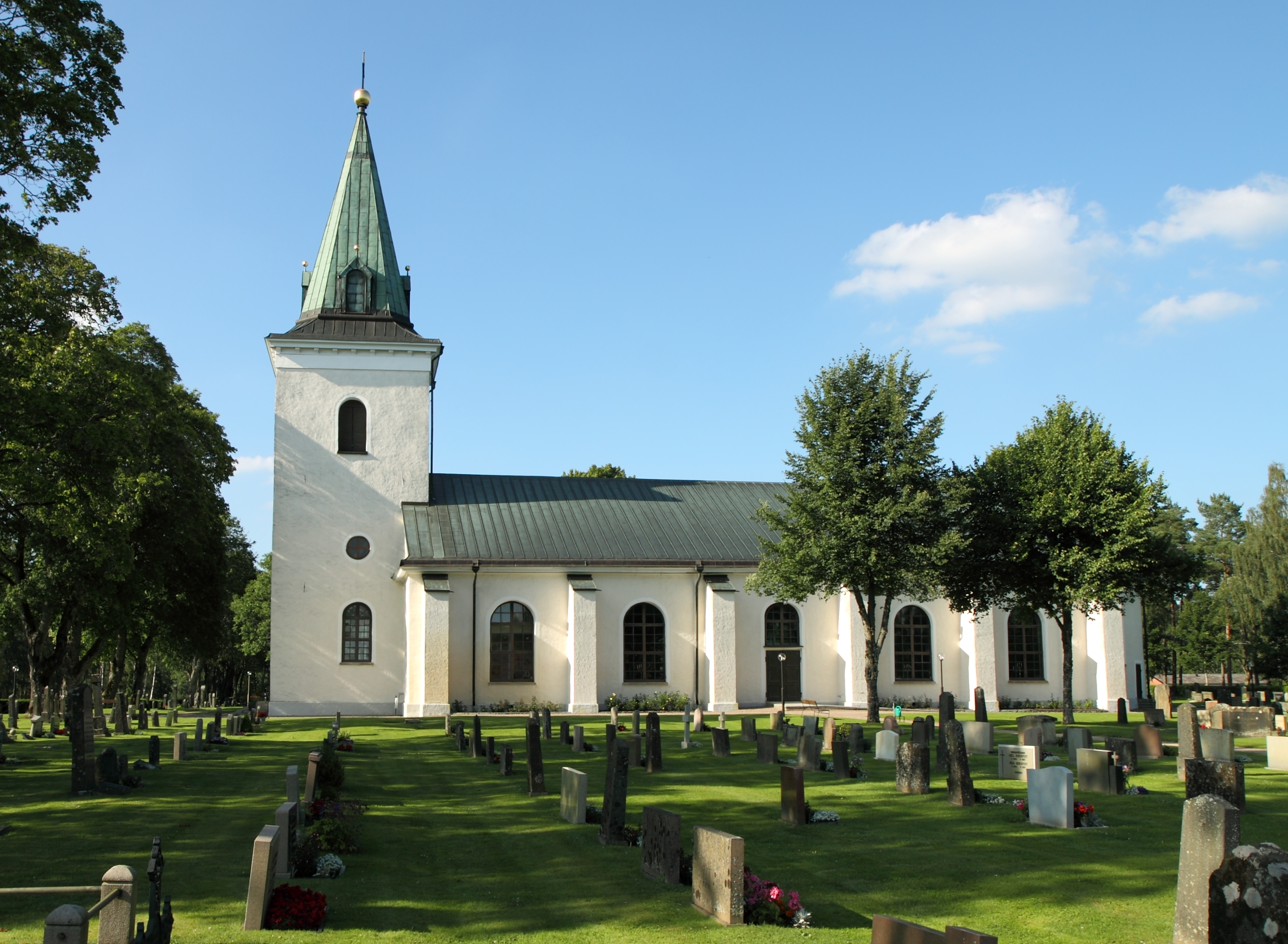 Berga kyrka.